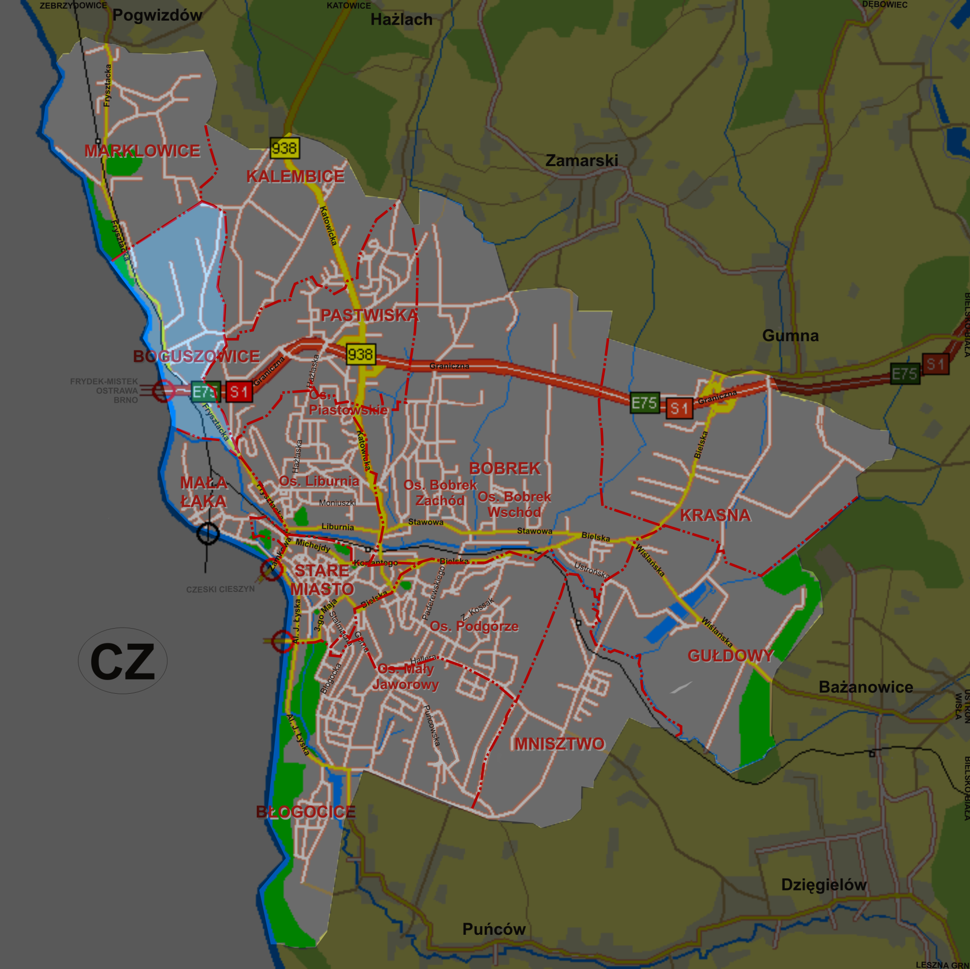 Boguszowice, dzielnica Cieszyna